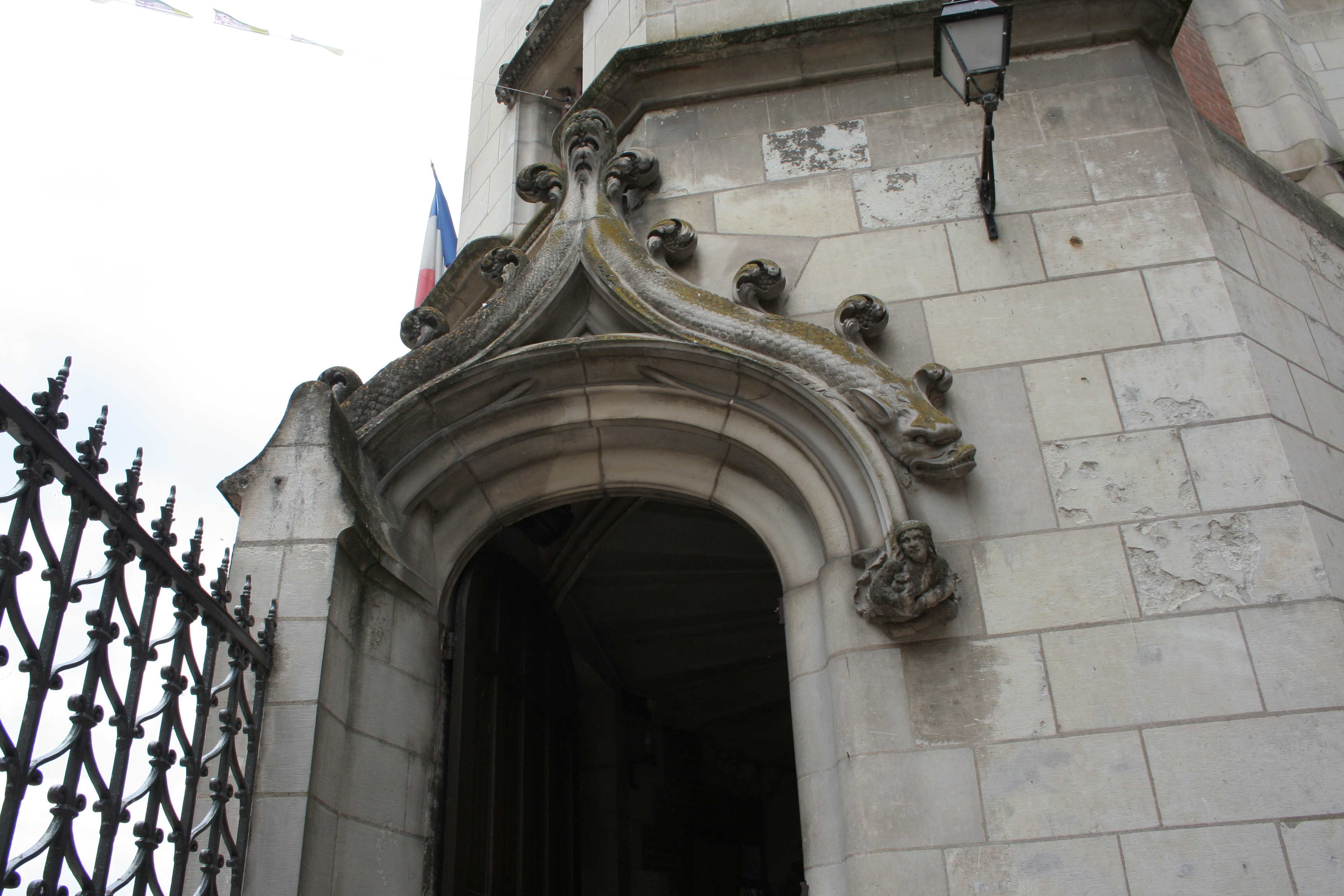 porte d'entrée de l'hôtel de ville